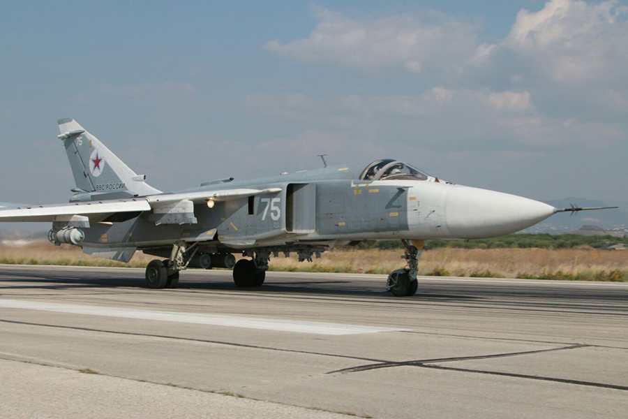 Боевые вылеты российской авиации с аэродрома «Хмеймим» для нанесения ударов по объектам террористов в Сирии